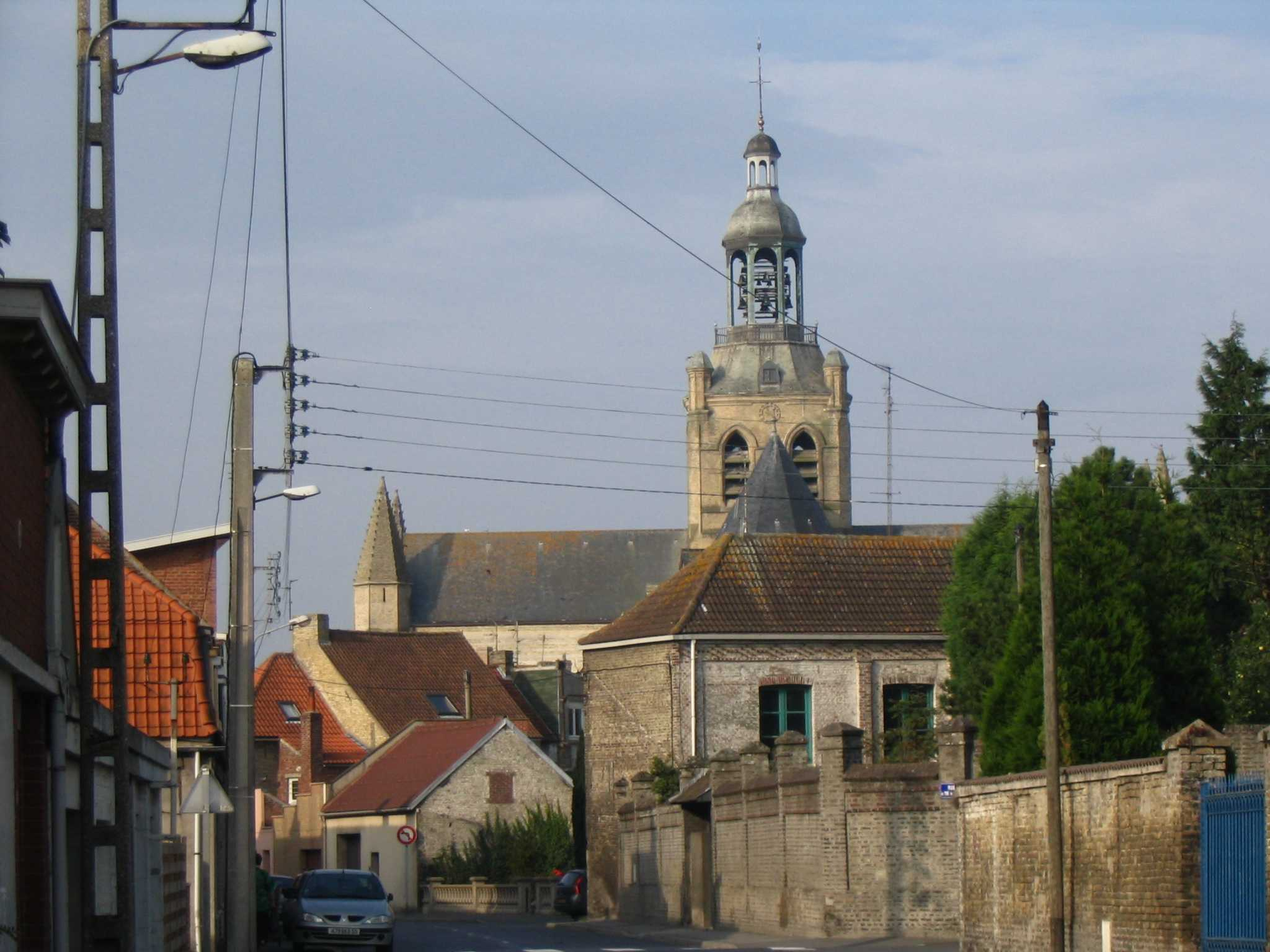 Eglise Saint-Jean-Baptiste de Bourbourg. Par Antoine.